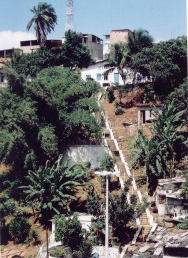 Imagem das escadarias da Casa de Oxumarê. Foto produzida na década de 90.